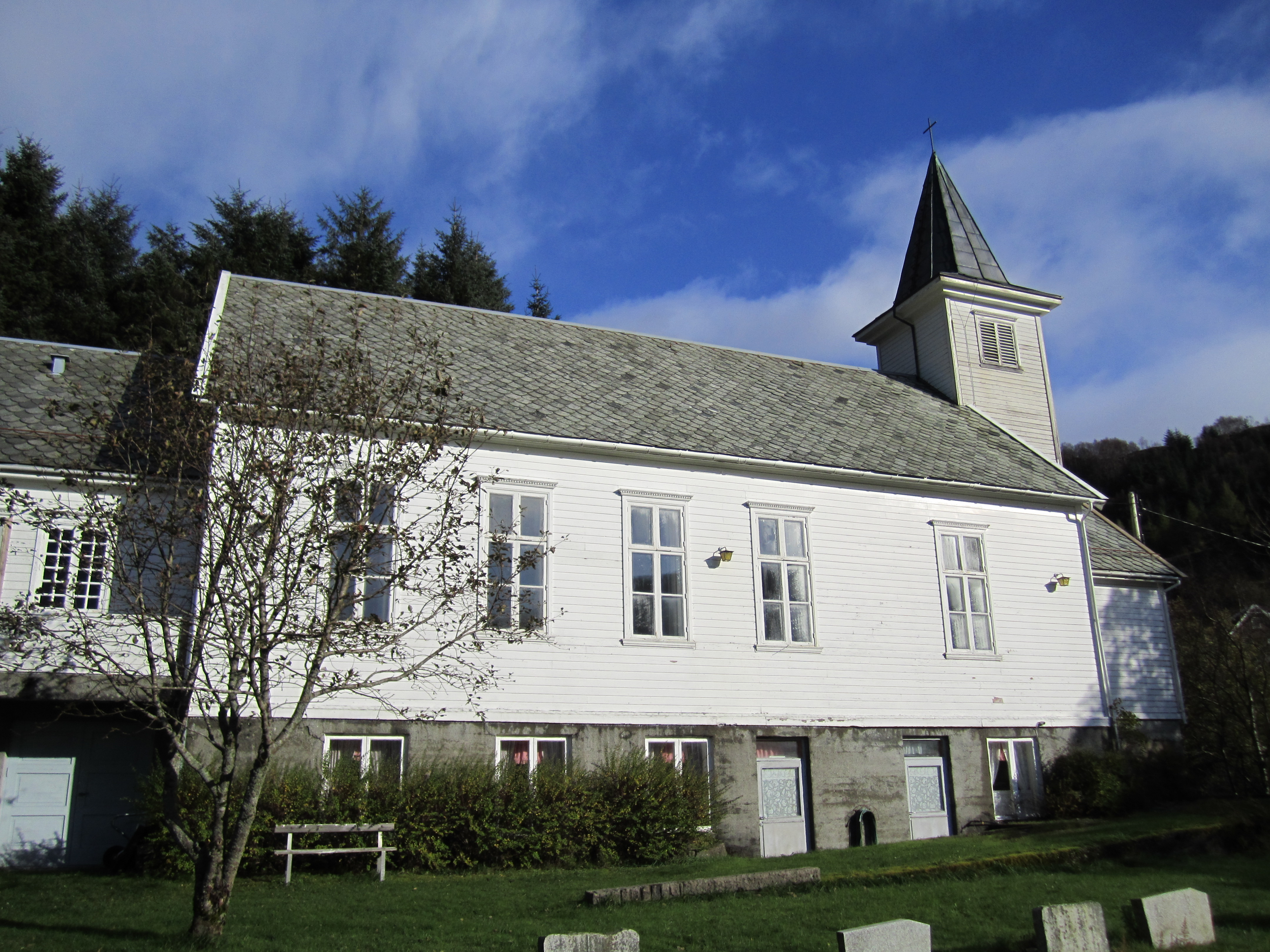 Stongfjorden bedehuskapell i Stongfjorden i Askvoll kommune i Sogn og Fjordane fylke.